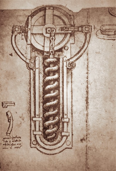 Schéma de Léonard de Vinci du rouet de mise à feu d'une arme à poudre noire (Codex Atlantic f.56v.-b.)